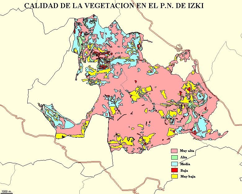 Calidad de la Vegetación Real del Parque Natural de Izki. Modificado de Sistema Cartográfico Ambiental de la Comunidad Autónoma del País Vasco. Gobierno Vasco. Soporte informático GESPLAN.